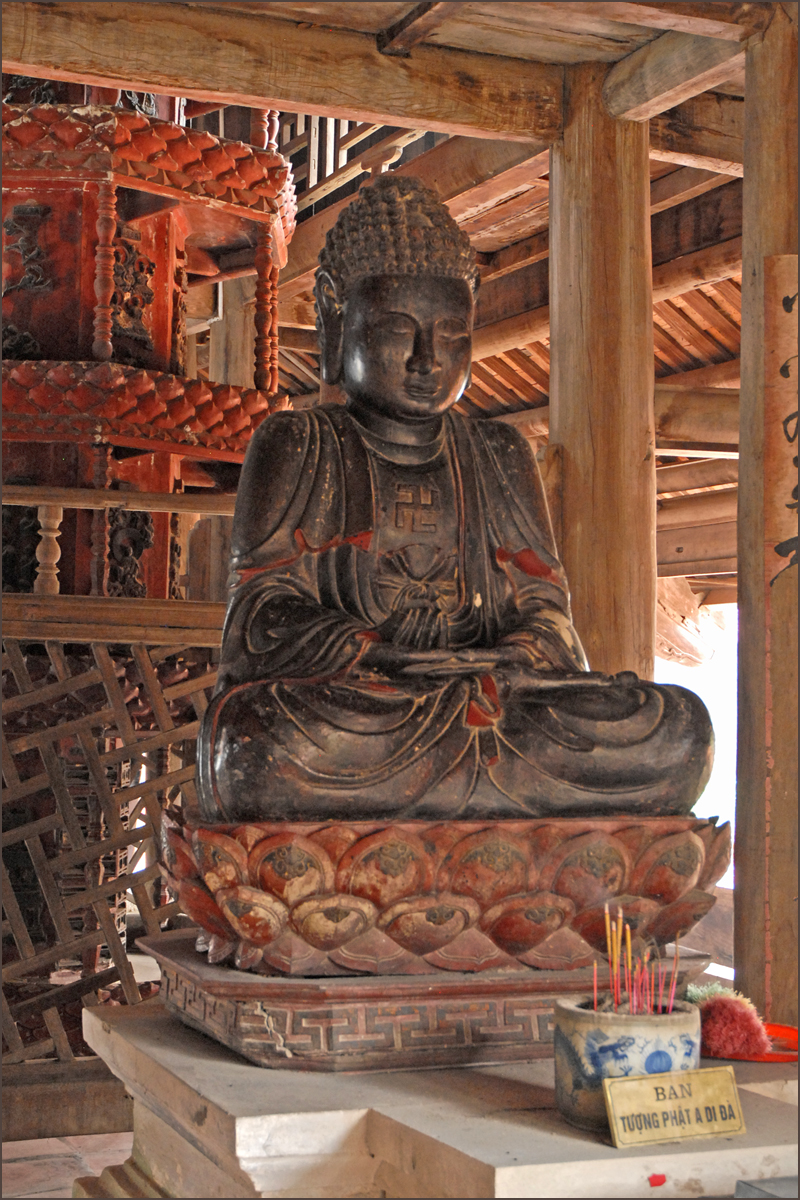 La pagode But Thap (Ninh-Phuc) s'élève dans le village de Dinh To, à 30 Km au sud-est de Hanoi. Elle a été érigée en 1646-1647 par le moine chinois Minh Hanh. Elle compte plusieurs bâtiments dont quatre sont entourés d'un mur d'enceinte. Les bâtiments sont reliés par des galeries.